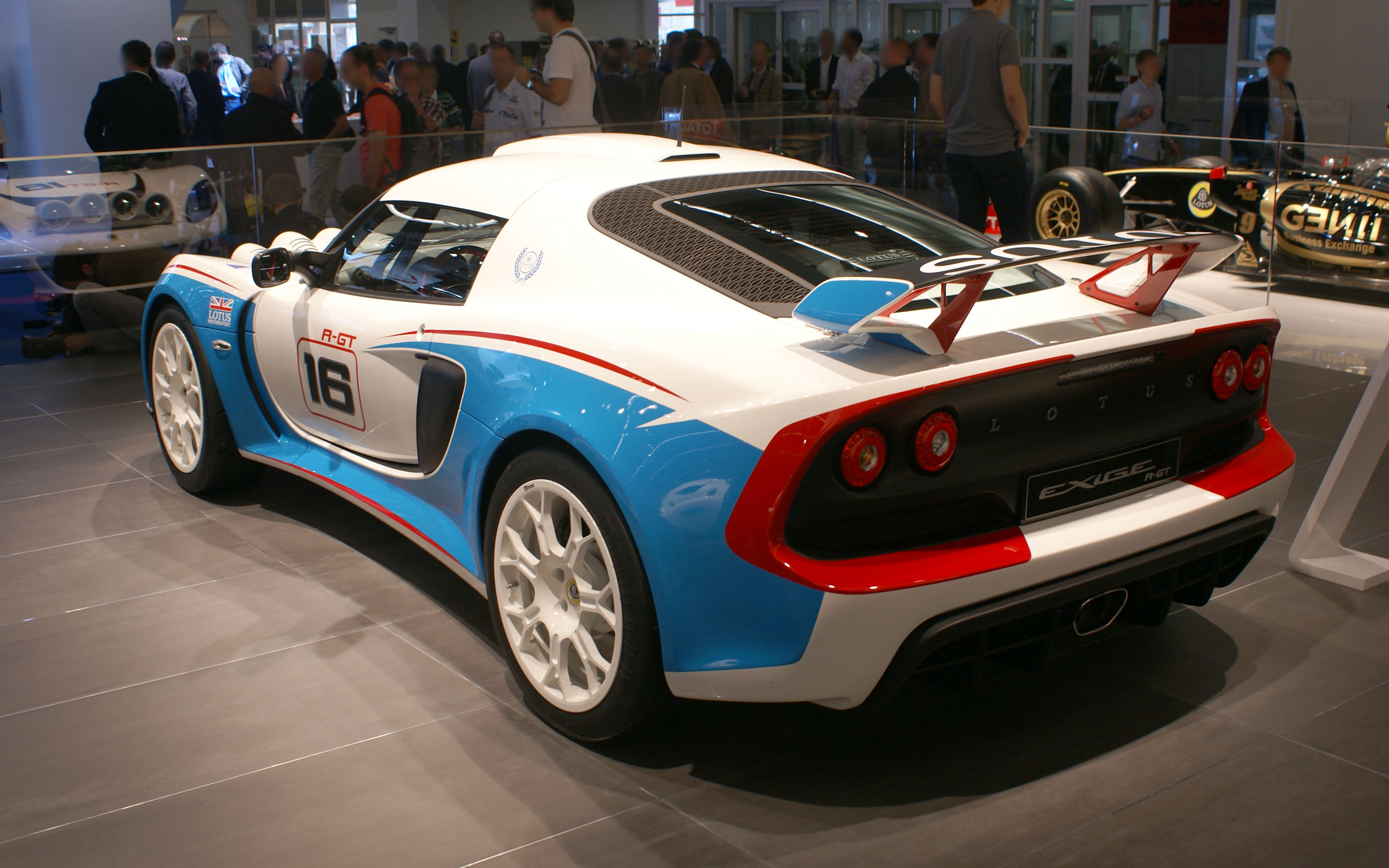 Lotus Exige R-GT